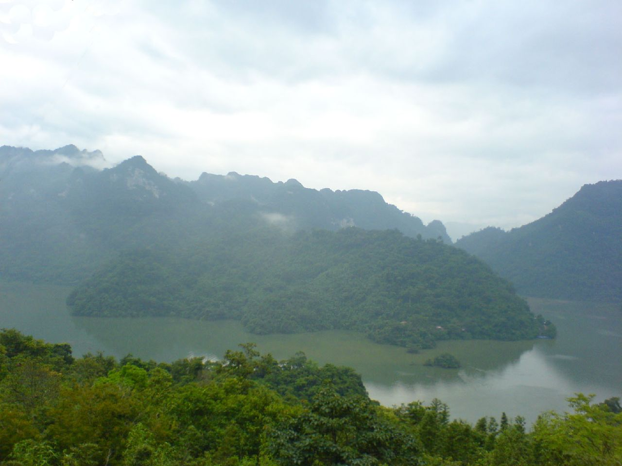 Hồ Ba BểParc national de Ba Be, nord Vietnam